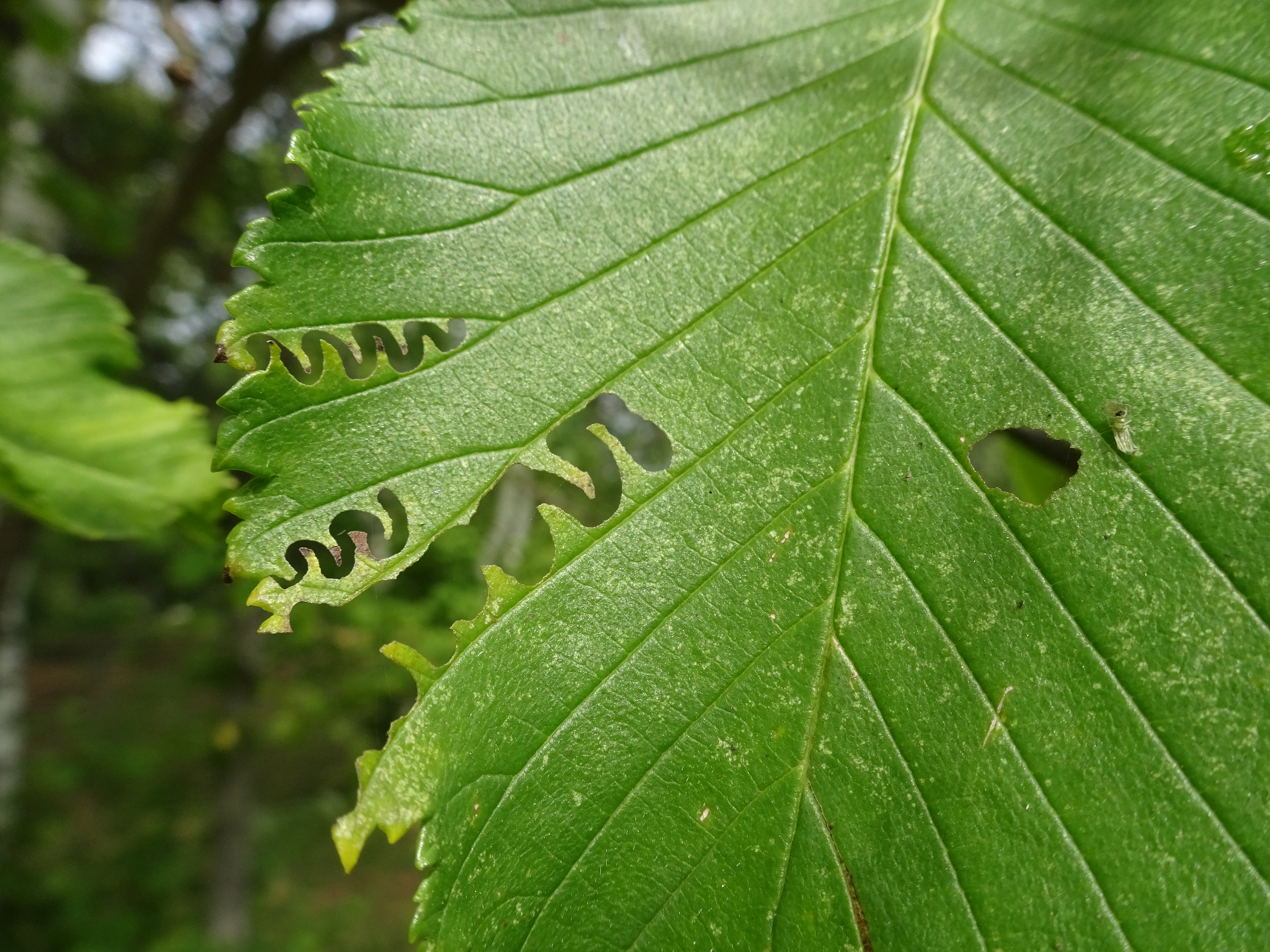 Aproceros leucopoda söömisjäljed Ulmus scabra lehel. Puhtu